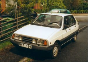 1986 Citroën Visa 14 RS in Örebro, Sweden